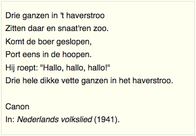 Tekst canon 'Drie ganzen in 't haverstro' (oudste vindplaats: 1644). Opgenomen in het liedboek "Nederlands volkslied", samengesteld door Pollmann en Tiggers (1941).